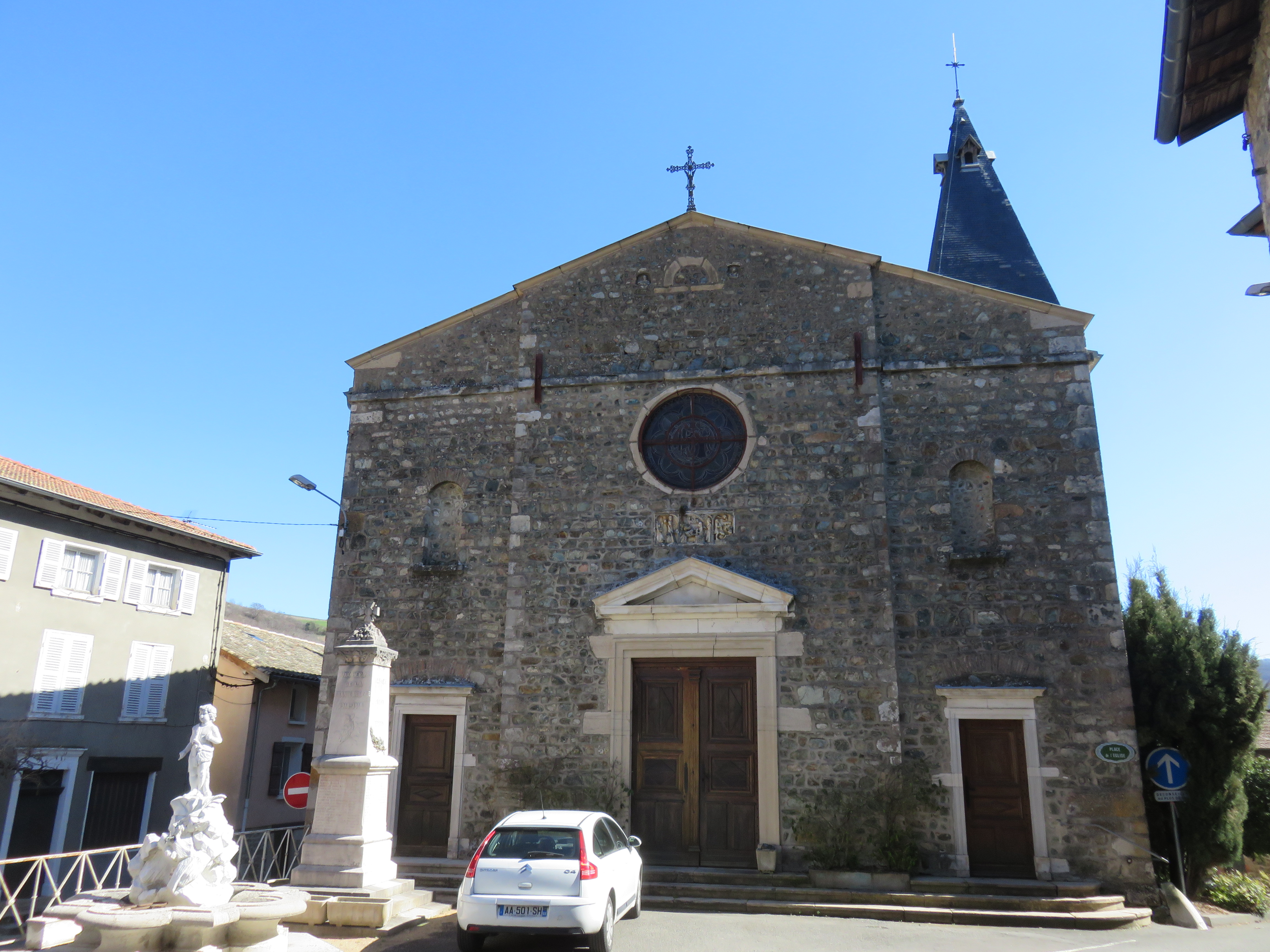 Centre-bourg de Marchampt (Rhône, France), avec l'église, le monument aux morts et la fontaine.